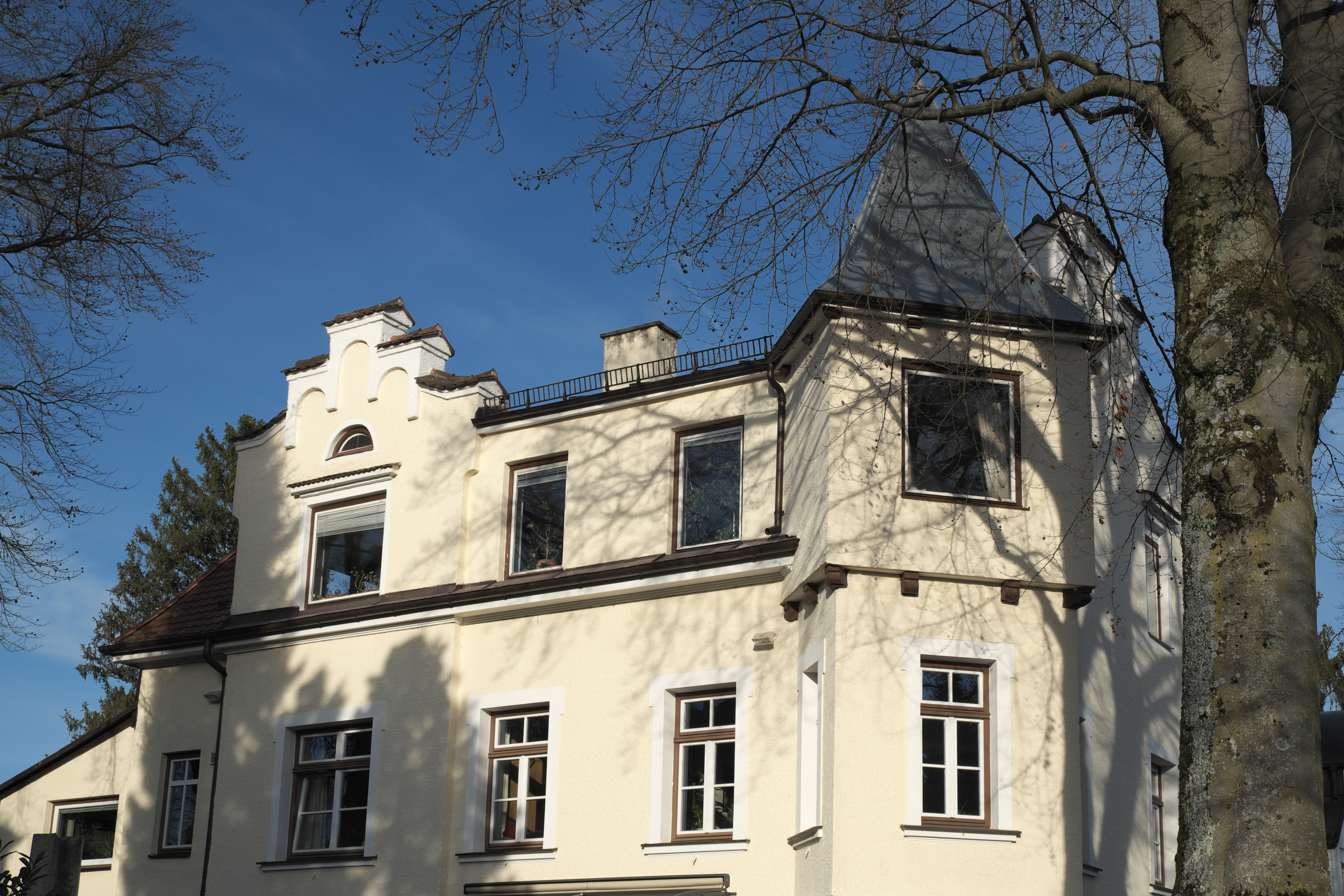 Villa in der Barystraße 3 in Obermenzing im Stadtbezirk Pasing-Obermenzing in München (Bayern/Deutschland), 1902 von Johann Schalk erbaut